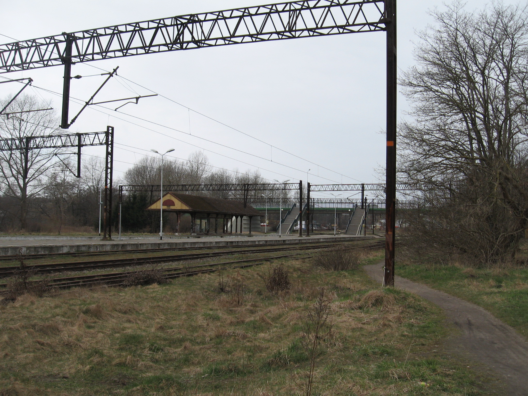 Dworzec PKP w Ustce